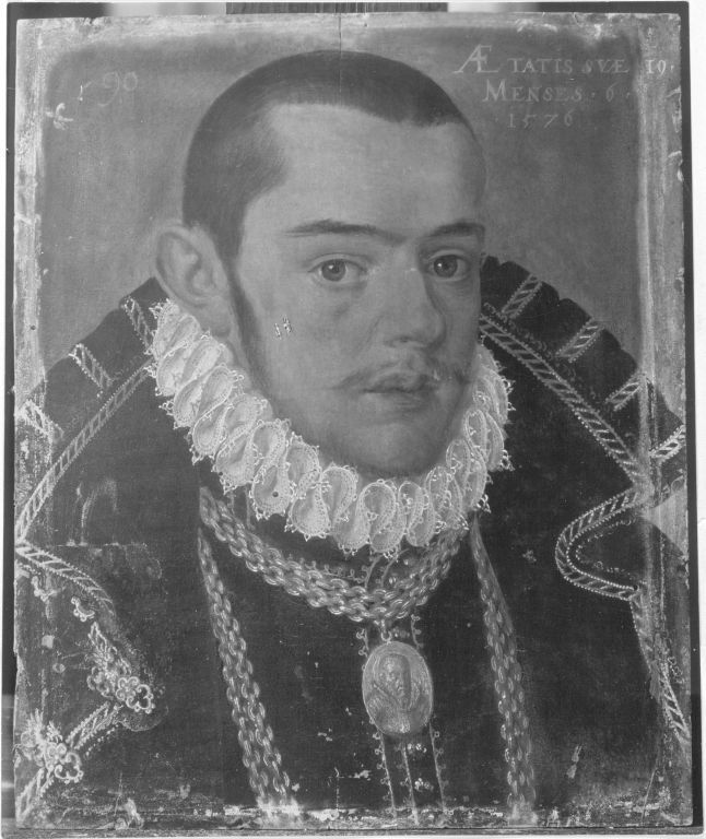 Otto Heinrich von Pfalz-Sulzbach (1556-1604, reg. 1582-1604)